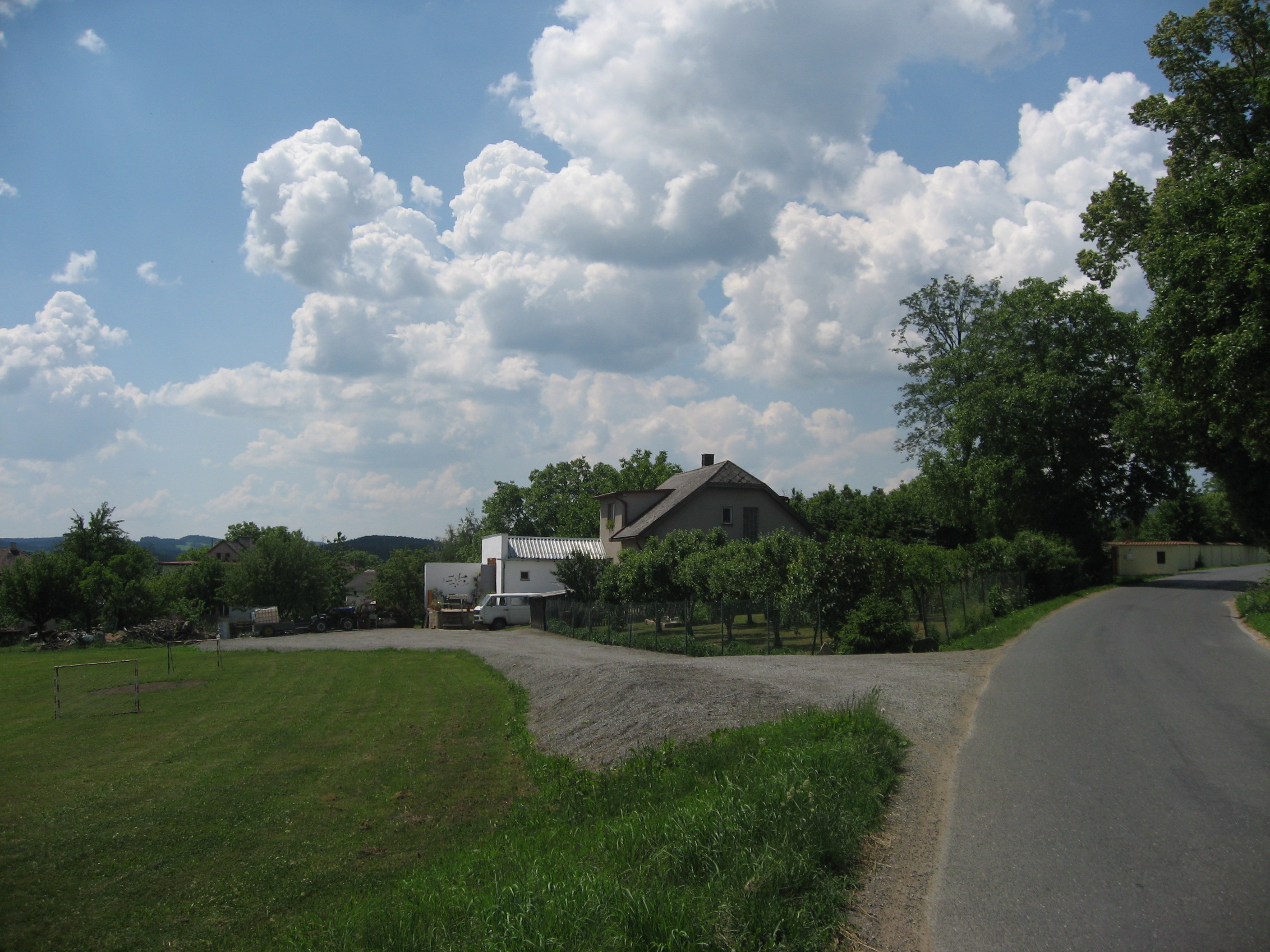 Radňov, část obce Květinov